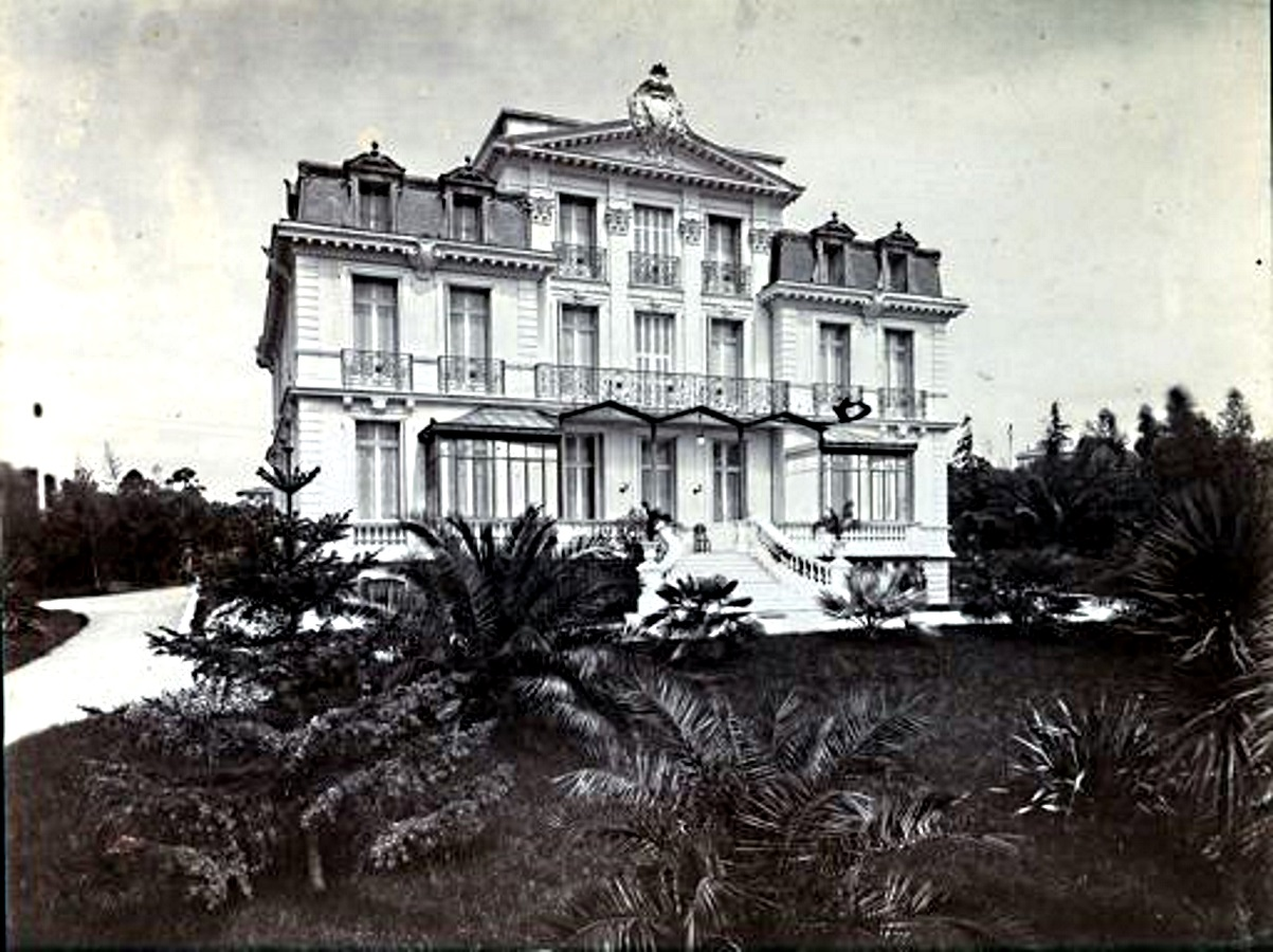 Château de Cimiez (actuelle Villa Nobili), quartier de Cimiez, Nice, France, vers 1900